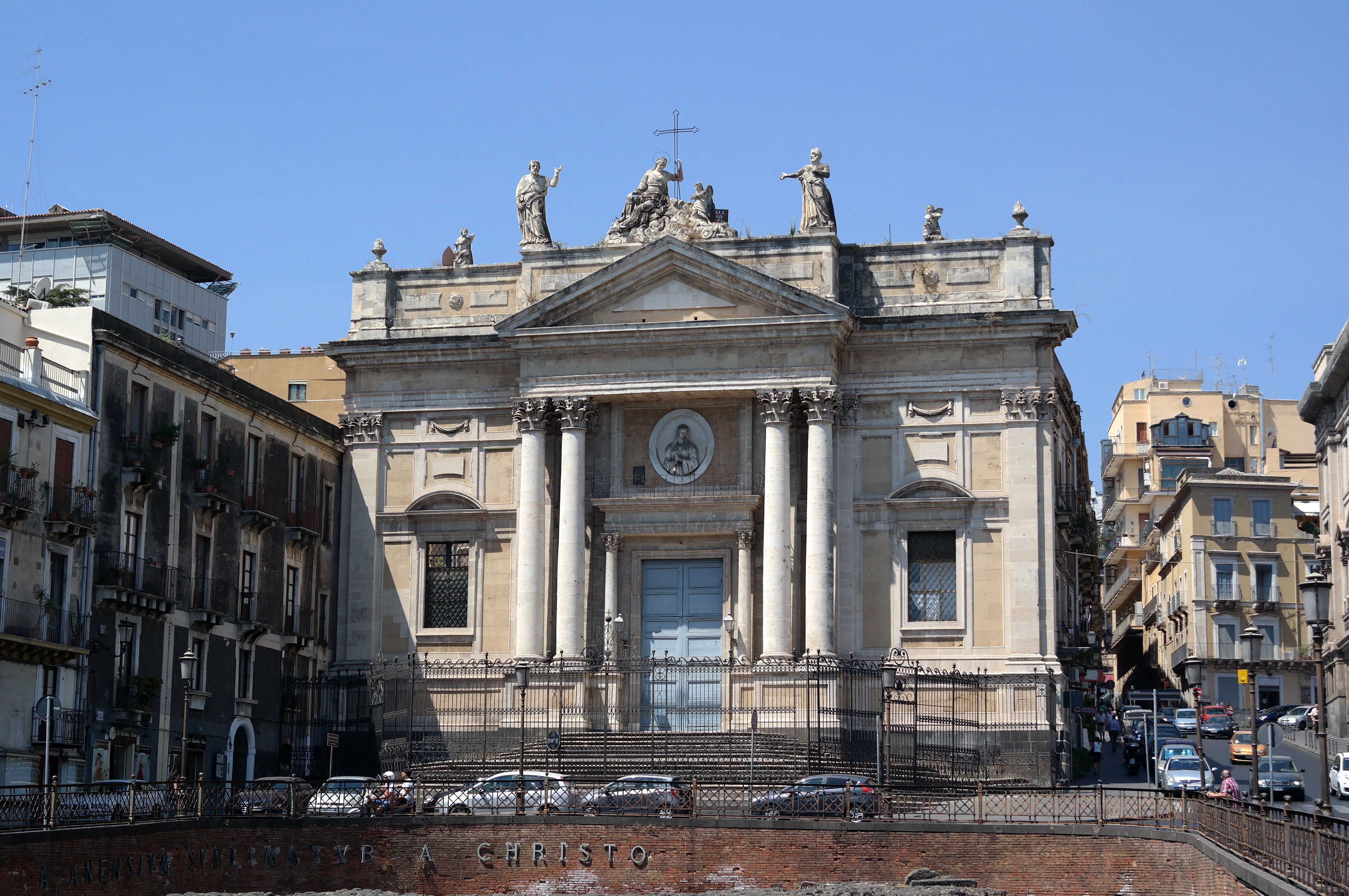 Chiesa di San Biagio a Catania